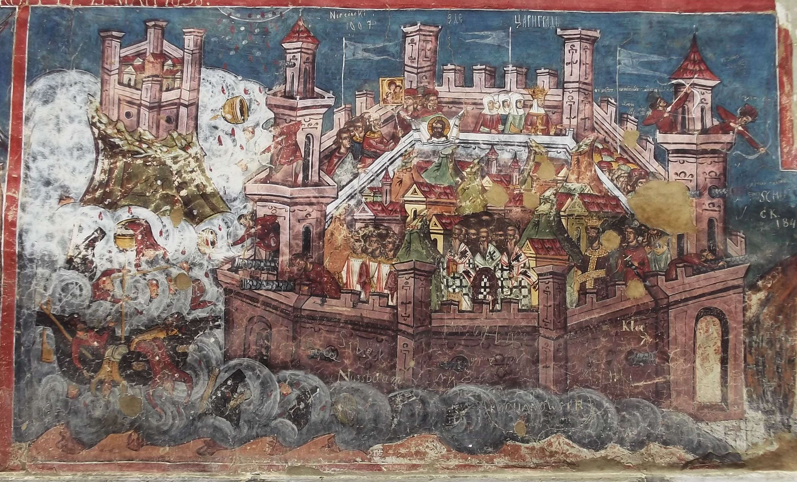 Biserica „Buna Vestire” de la Mănăstirea Moldovița, pictură exterioară 01